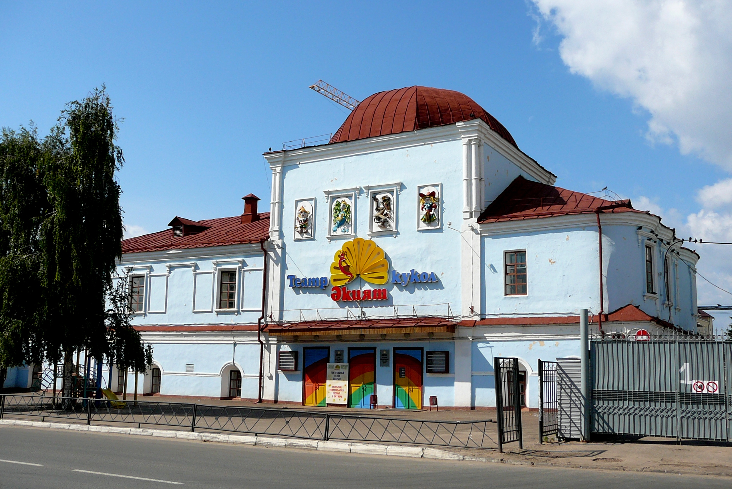 Здание бывшей Церкви Сошествия Святого Духа в Казани, занятое под бывшее здание Театра кукол "Әкият".